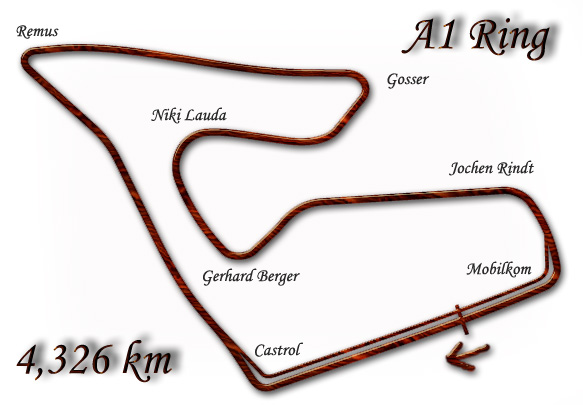 Plánek trati Grand Prix Rakouska (Zařazený do mistrovství světa Formule 1 v roce 2000-2003).